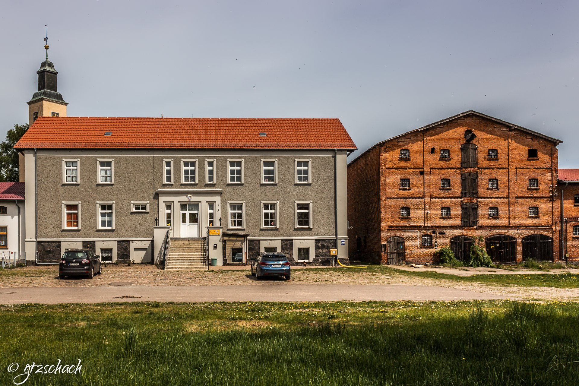 Frauenhagen,Gutsanlage mit Gutshaus, Speicher und vier Stallgebäuden, Brennereigebäude sowie Resten des Hoftors, der Gutsmauer und Hofpflasterung